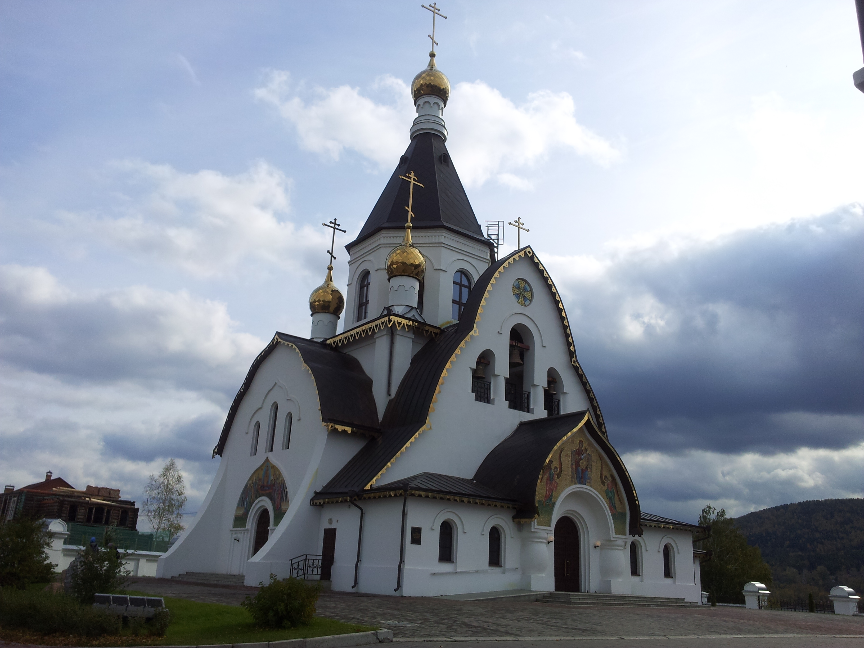 Храм в честь иконы Божией Матери «Всецарица» в Свято-Успенском монастыре Красноярска